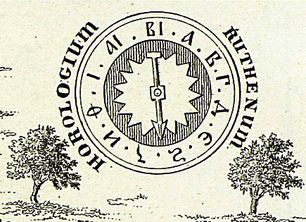 Руський дзиґар (український годинник). Інокентій Ґізель (1600—1683). План Ближніх і Дальніх печер (фрагмент)